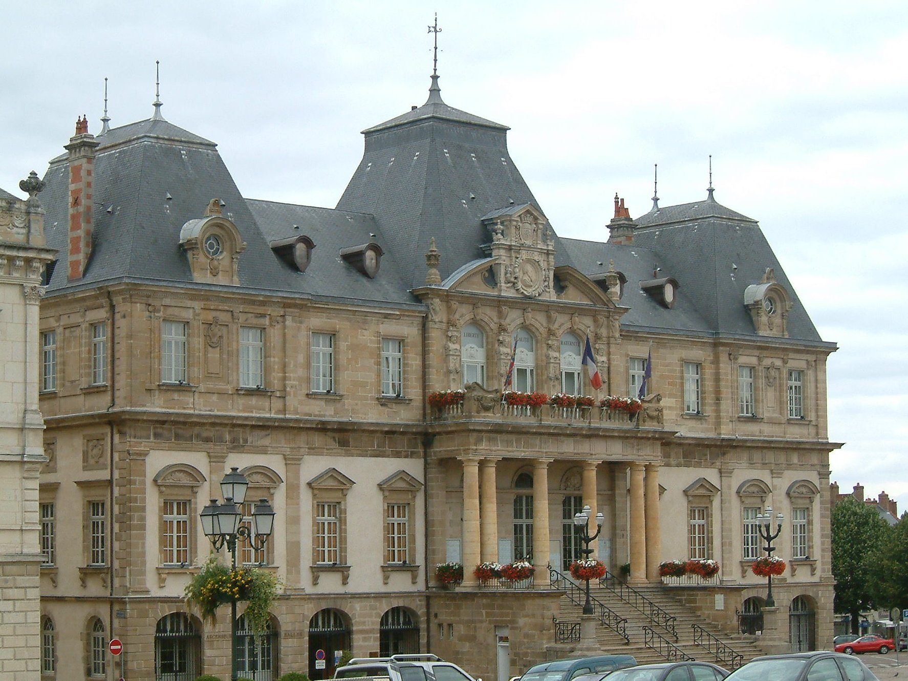 Hôtel de ville, Autun, Bourgogne, FRANCE